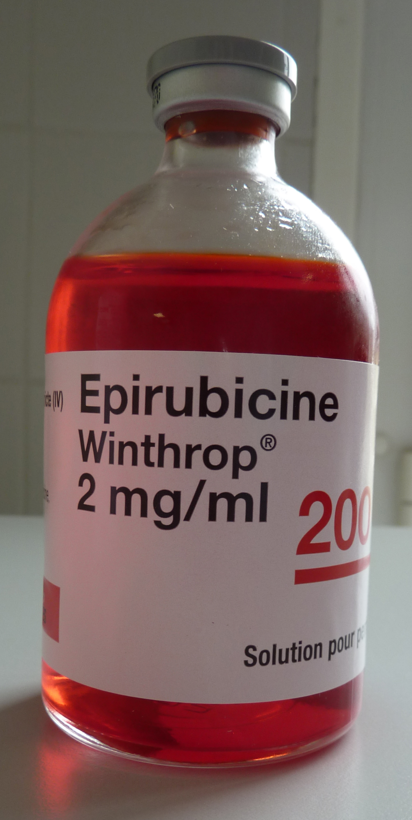 Flacon d'épirubicine